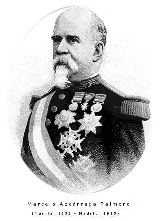 Marcelo Azcárraga Palmero (1832 - 1915) militar y político español 1898